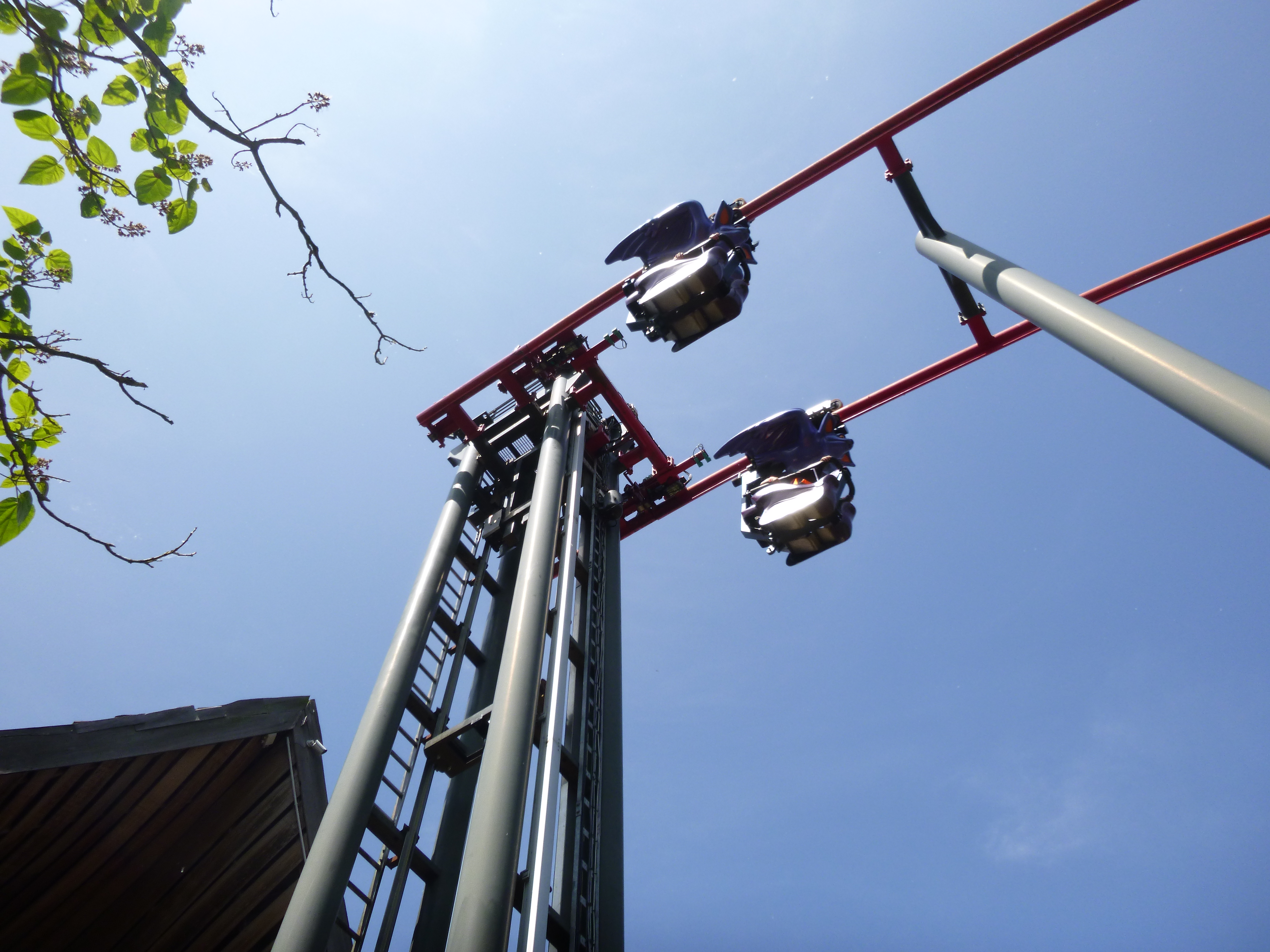 Vleermuis Plopsaland